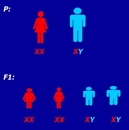 аутор: Снежана Трифуновић